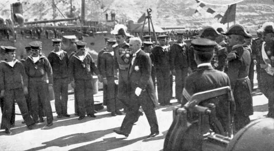 Spaniens König Alfons XIII. und Frankreichs Präsident Raymond Poincaré mustern die Besatzung des neuen spanischen Kriegsschiffs "España" im Arsenal von Cartagena